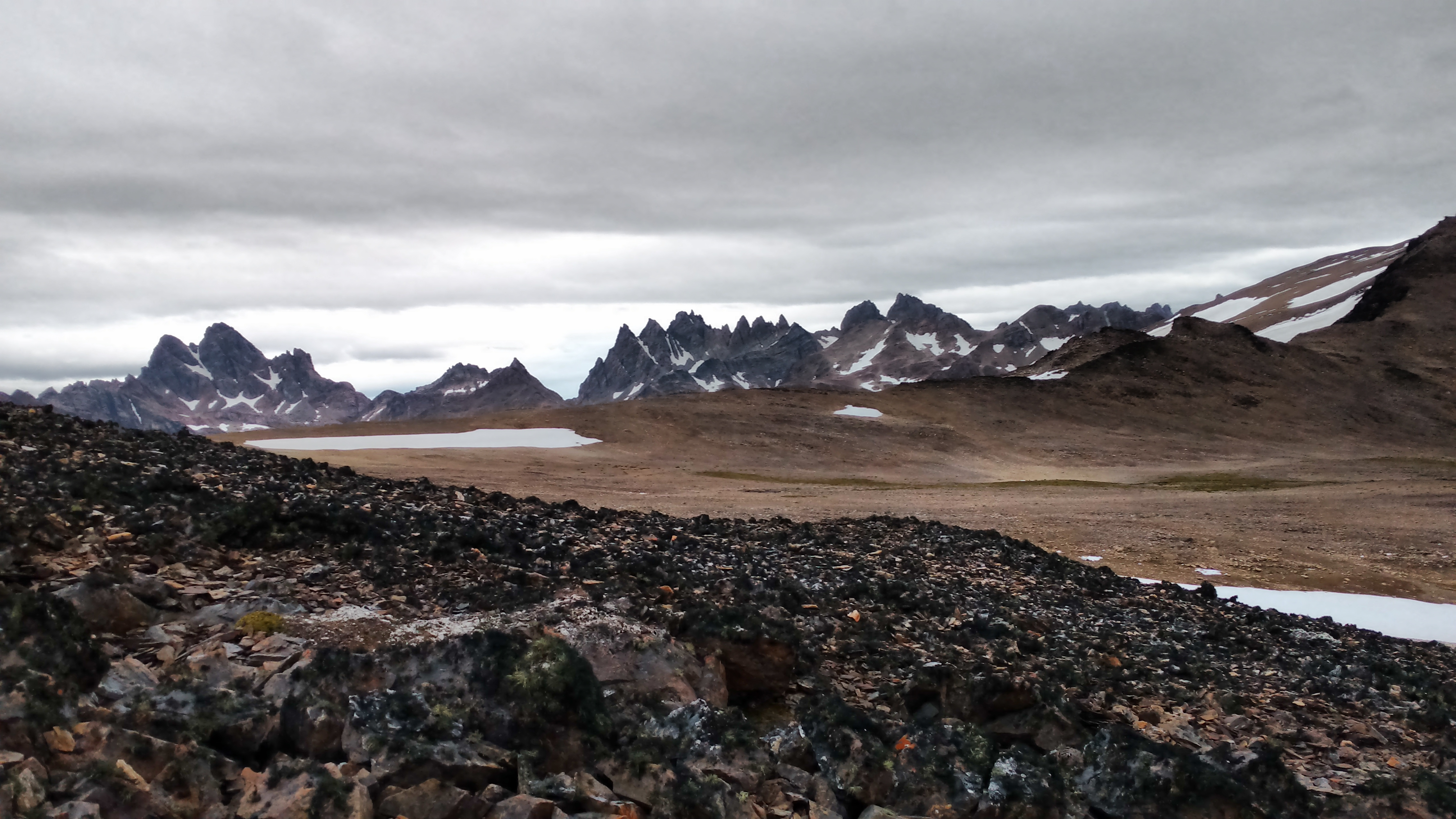 Dientes de Navarino visto desde las alturas del Cerro Bandera, Comuna de Cabo de Hornos, Chile